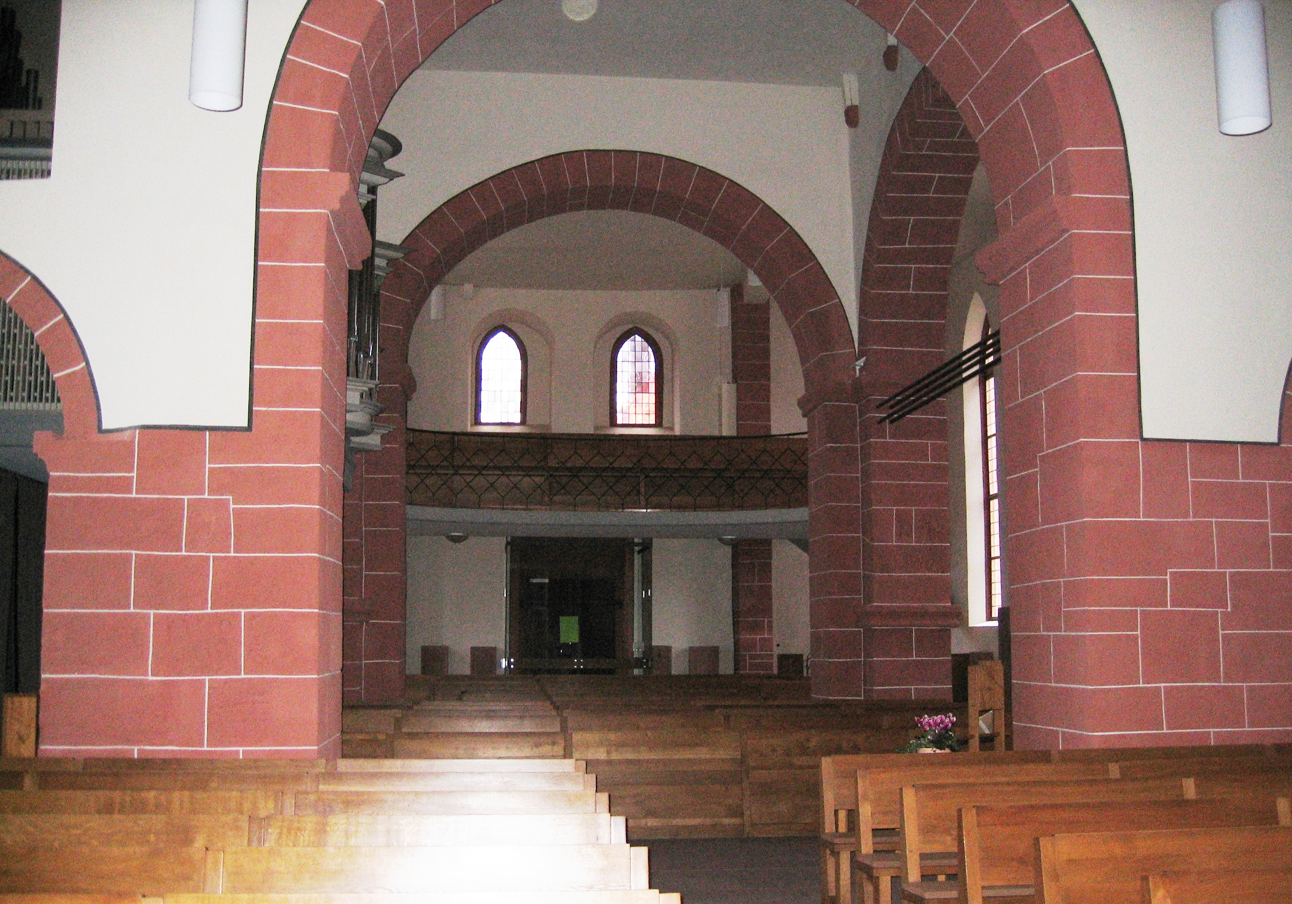 Innenraum der Evangelischen Stadtkirche in Schlitz (Vogelsbergkreis).